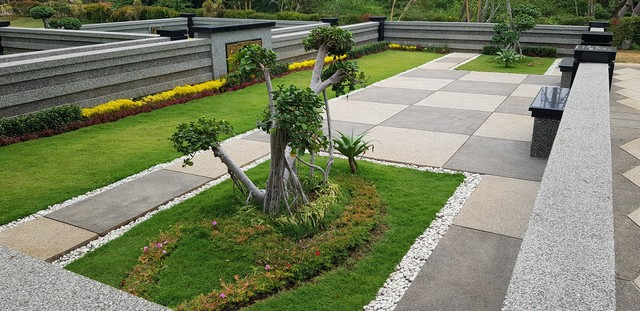 Pemakaman Islam Al Azhar Memorial Garden Karawang jauh dari kesan angker dan seram